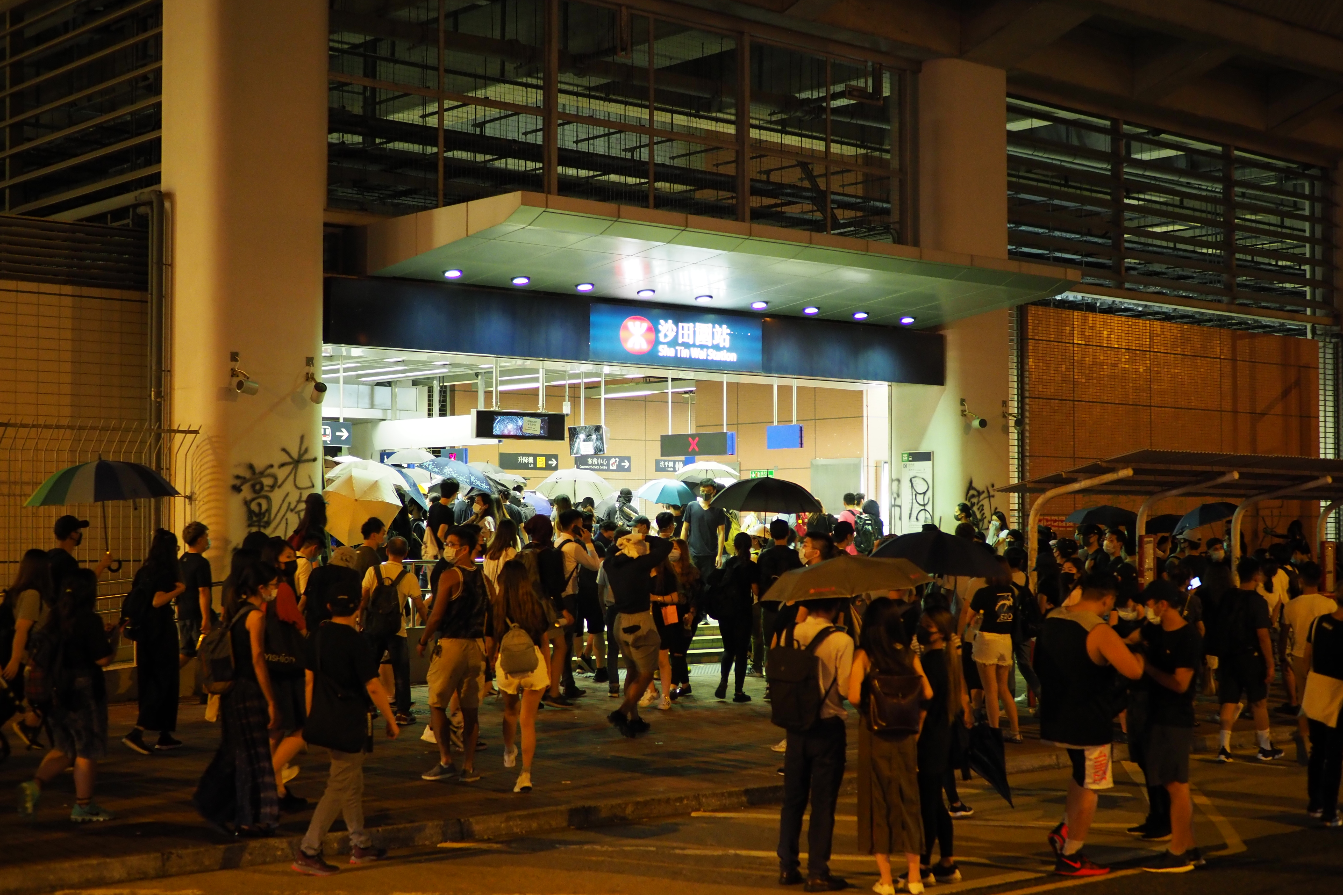 2019-10-04 Protesten in Hong Kong